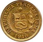 Moneda peruana de una libra de oro, año 1918